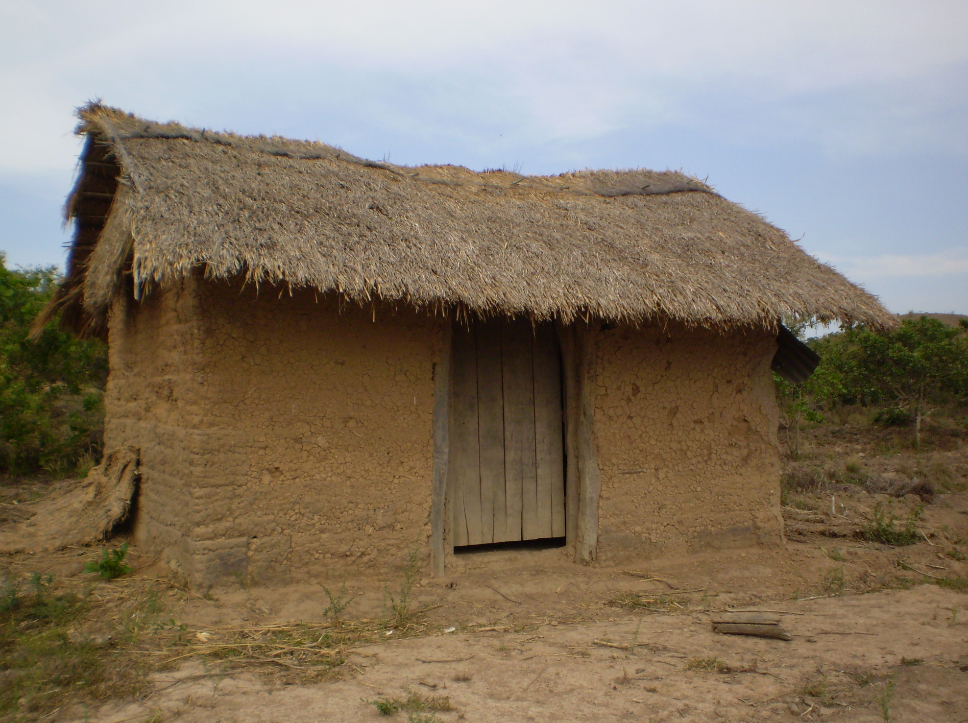 Ngôi nhà tranh vách đất ở huyện Cư Kuin, Đắk Lắk, Việt Nam